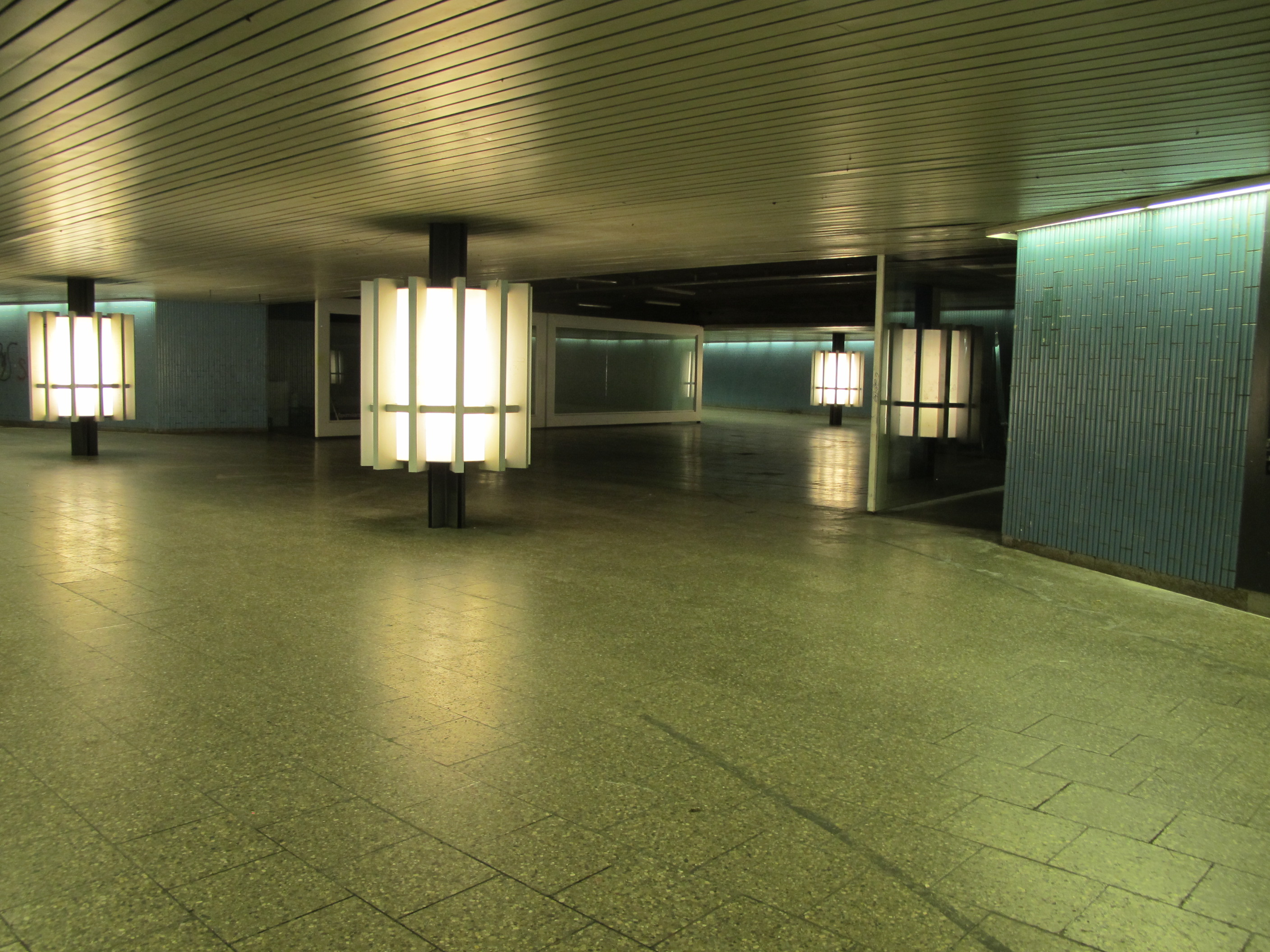 Maximiliansforum Semptember 2014